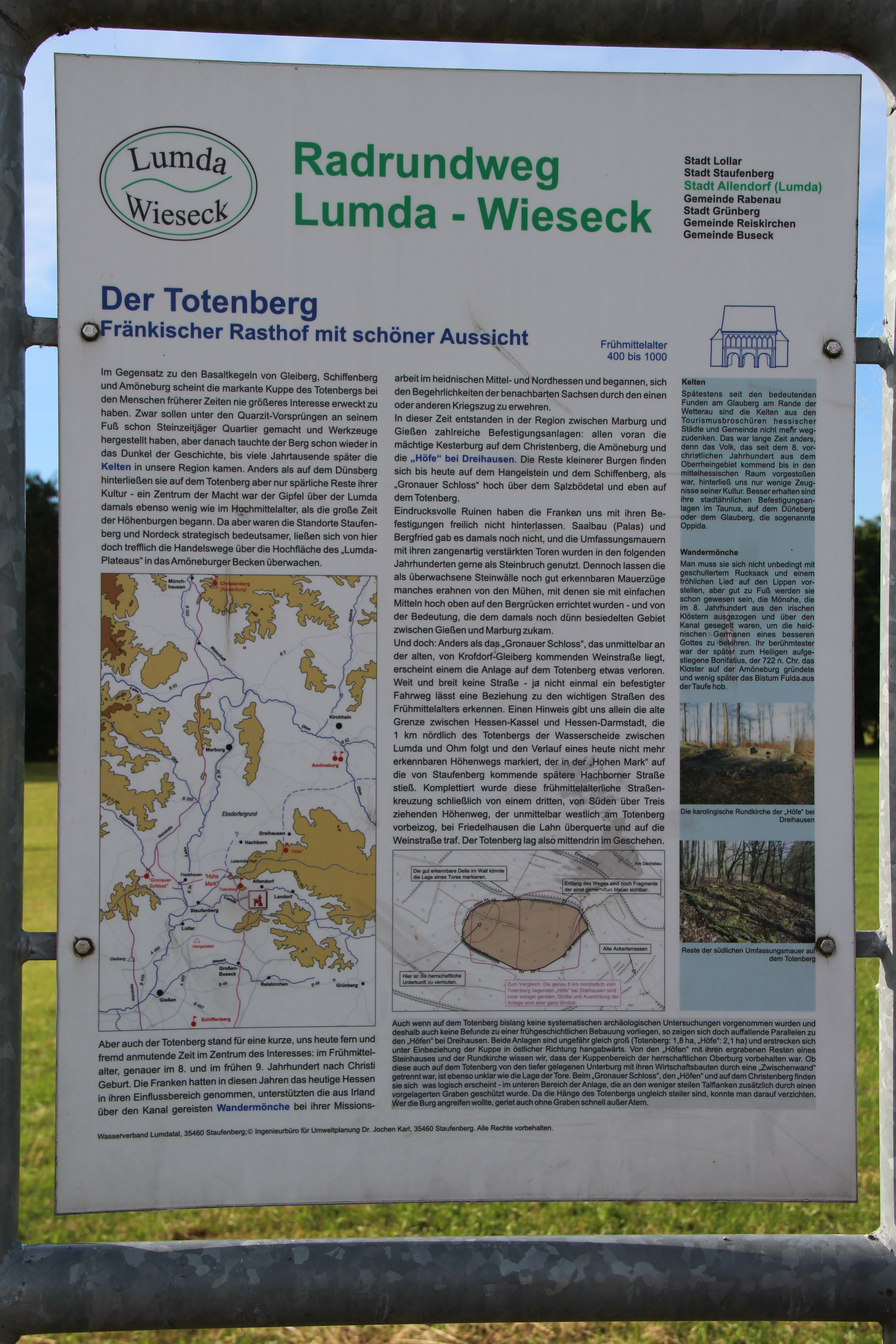 Hinweistafel Totenberg